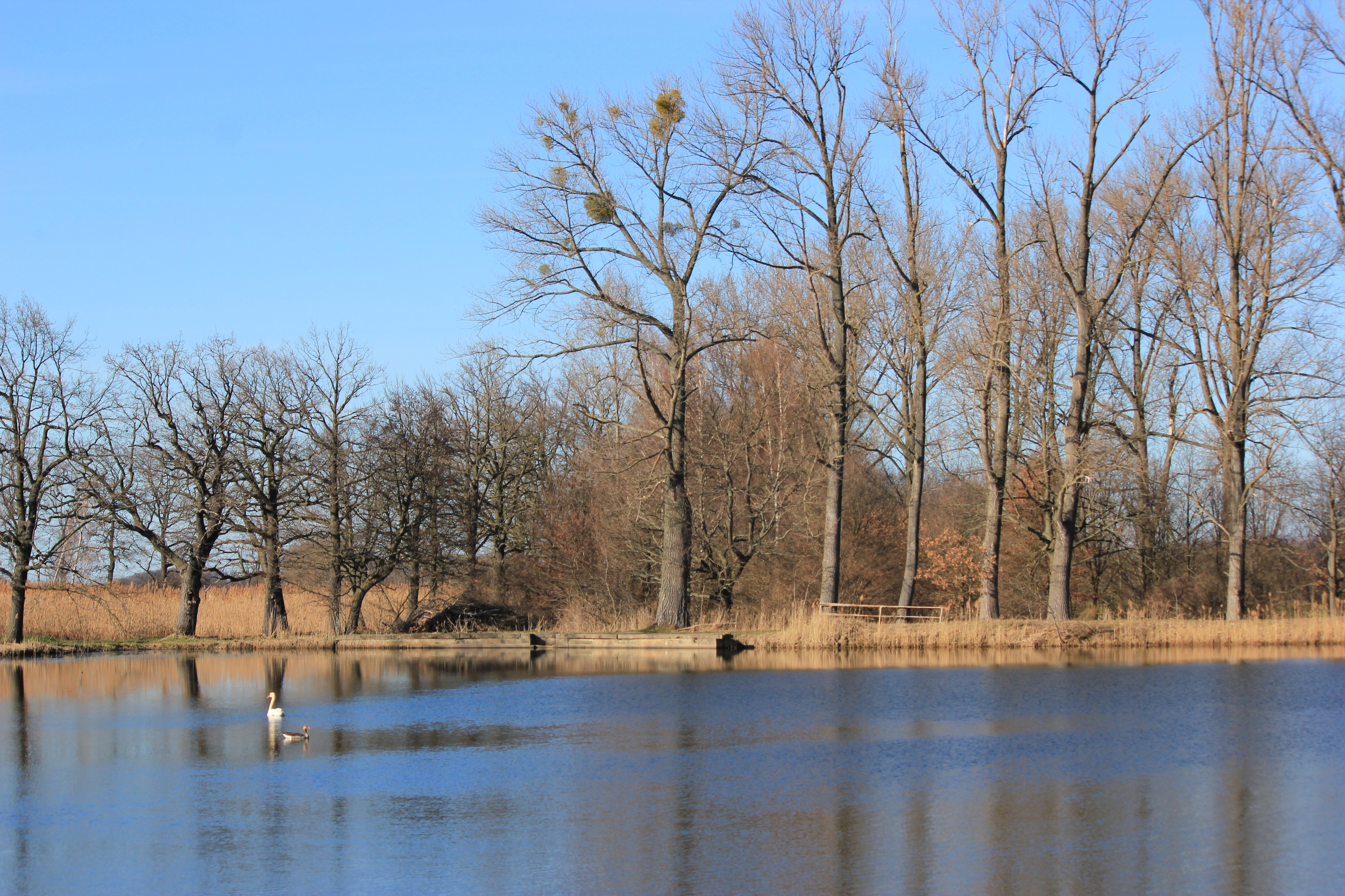 Hornjoserbsce: W Komorowskich hatach.